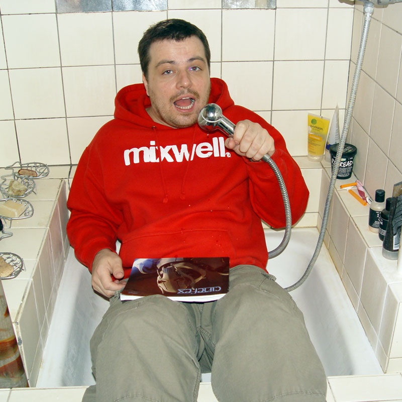 Lügner (Musiker, Schweizer Rapper, Zürich)